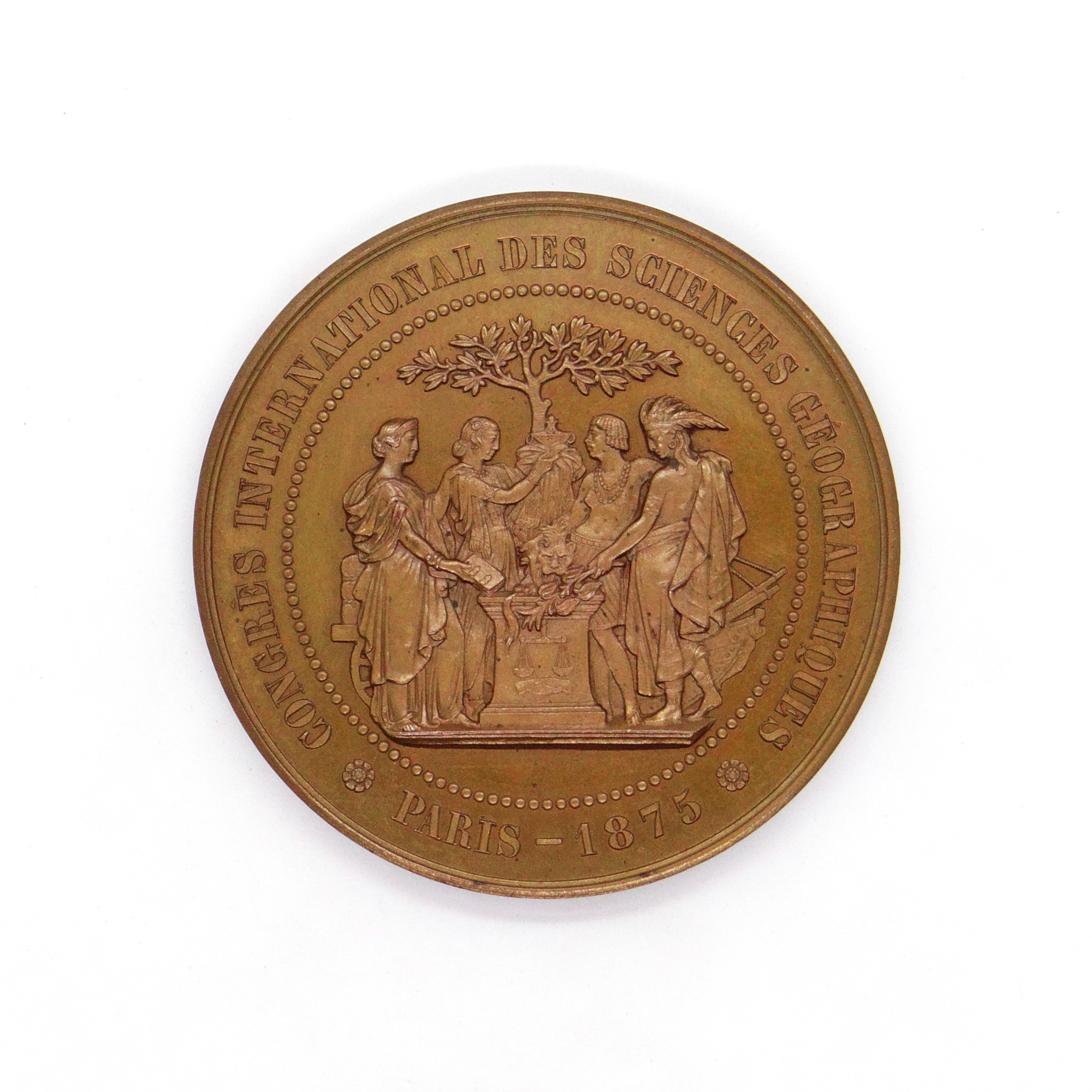 Légende : Congrès international de Sciences géographiques de Paris, 1875, auteur inconnu (avers) Sujet : Groupe de quatre personnages représentant les quatre races de la terre apportant les produits de leur pays (description issue de l'inventaire de Léon Losseau) Médaille : tranche lisse, en cuivre.